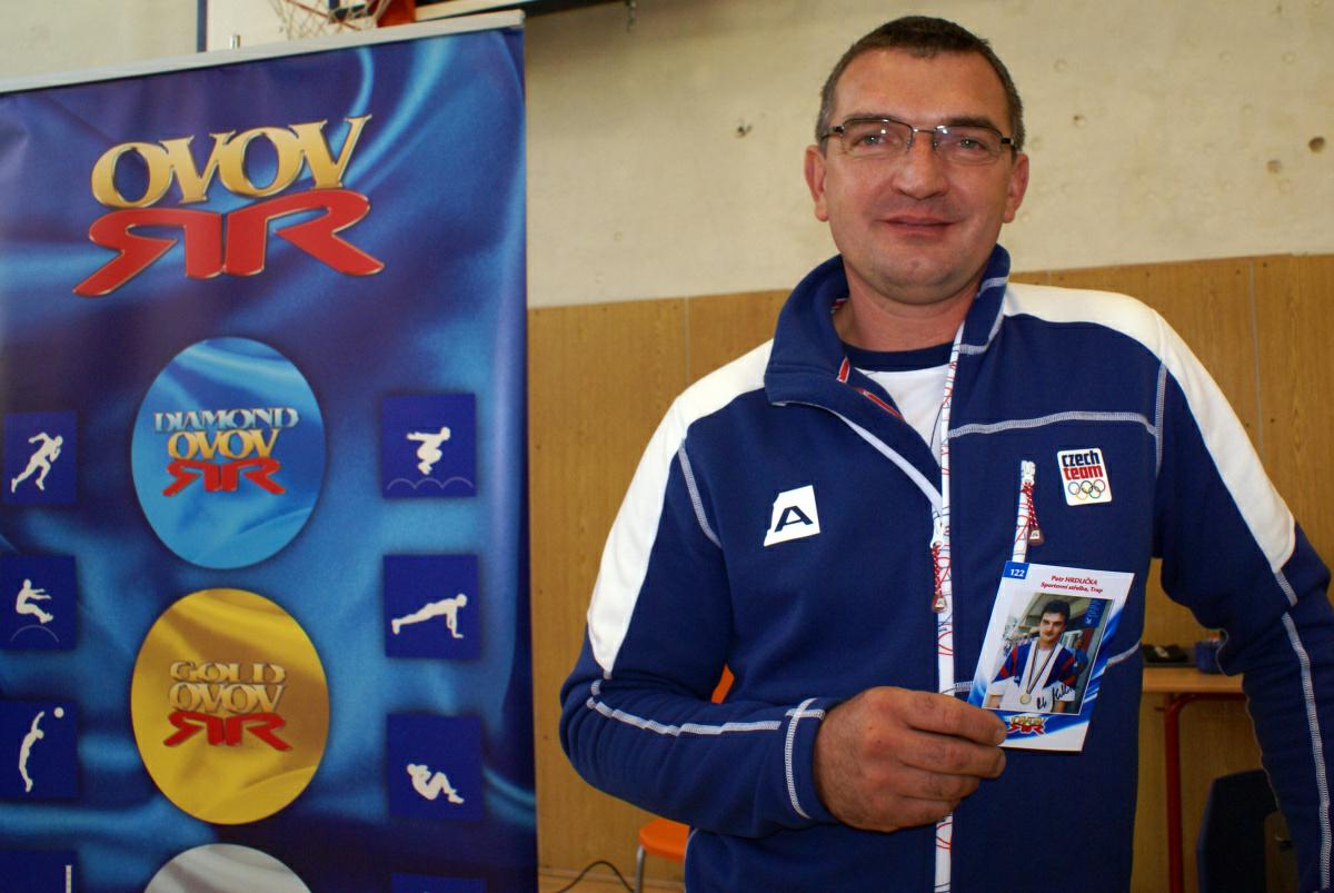 Petr Hrdlicka (11.10.2012)